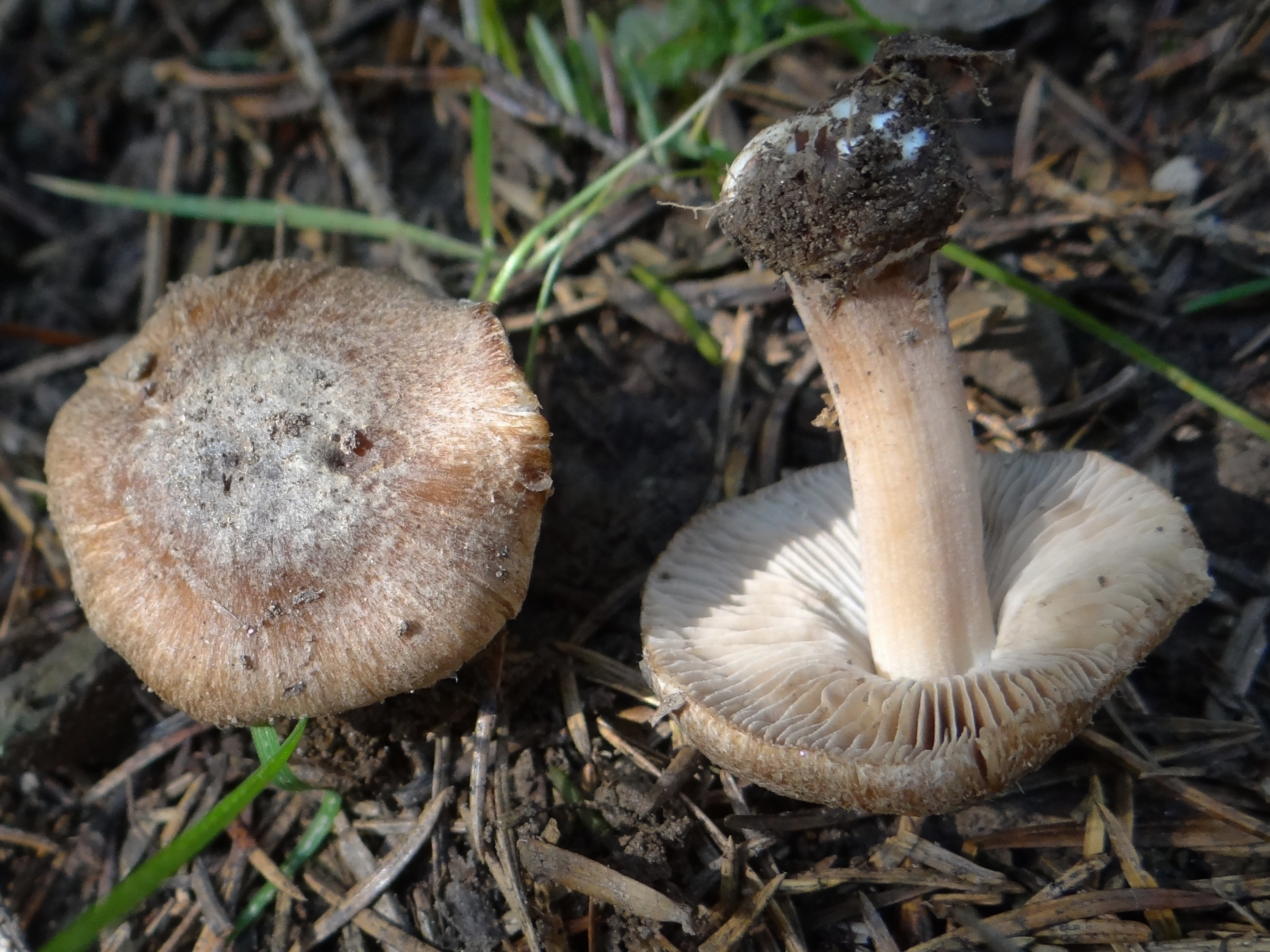 Inocybe assimilata. Location: Poland, Trzciana, woj. małopolskie